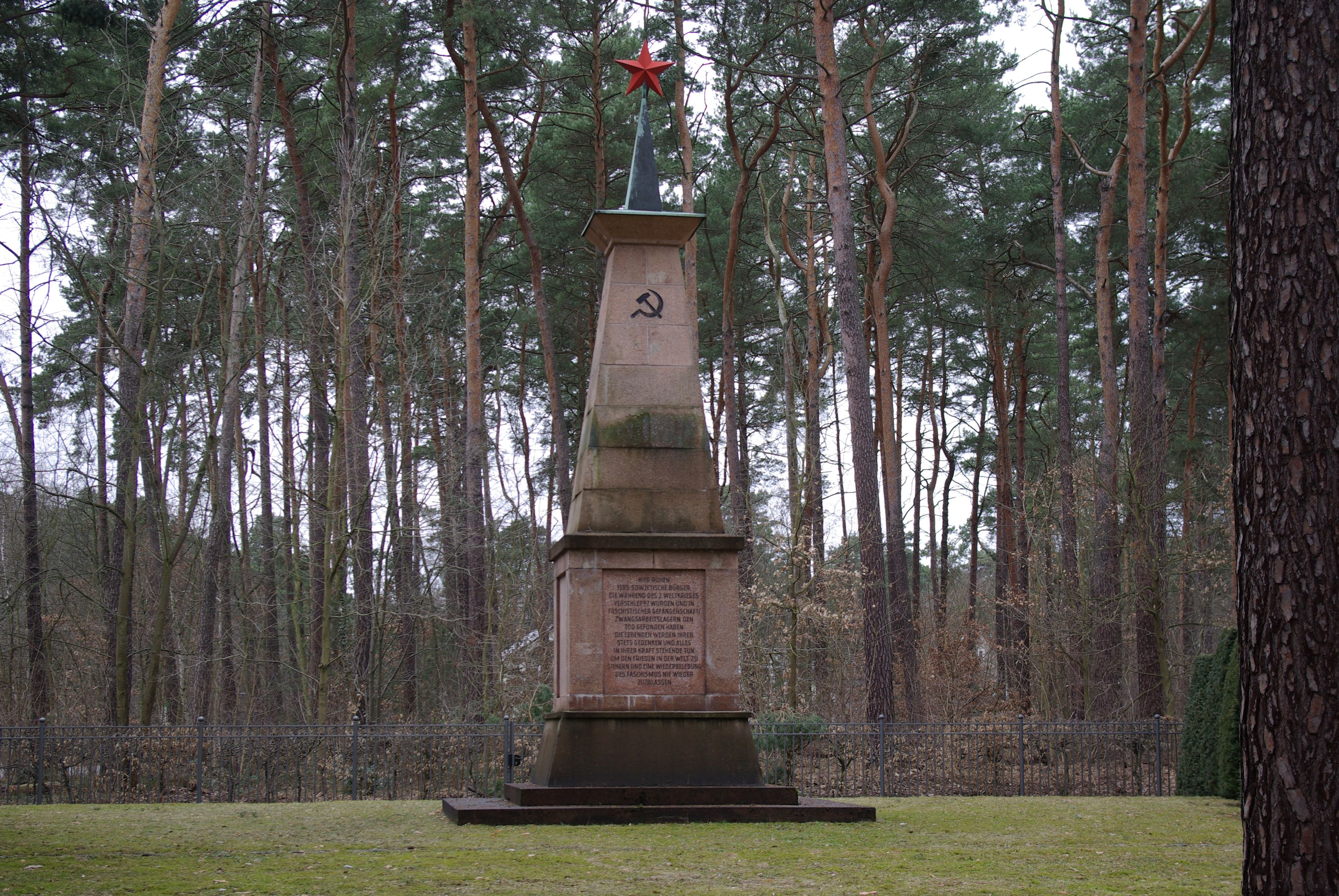 Stahnsdorf in Brandeburg. Das Sowjetische Ehrendenkmal steht auf dem Wilmersdorfer Waldfriedhof Güterfelde und steht unter Denkmalschutz.